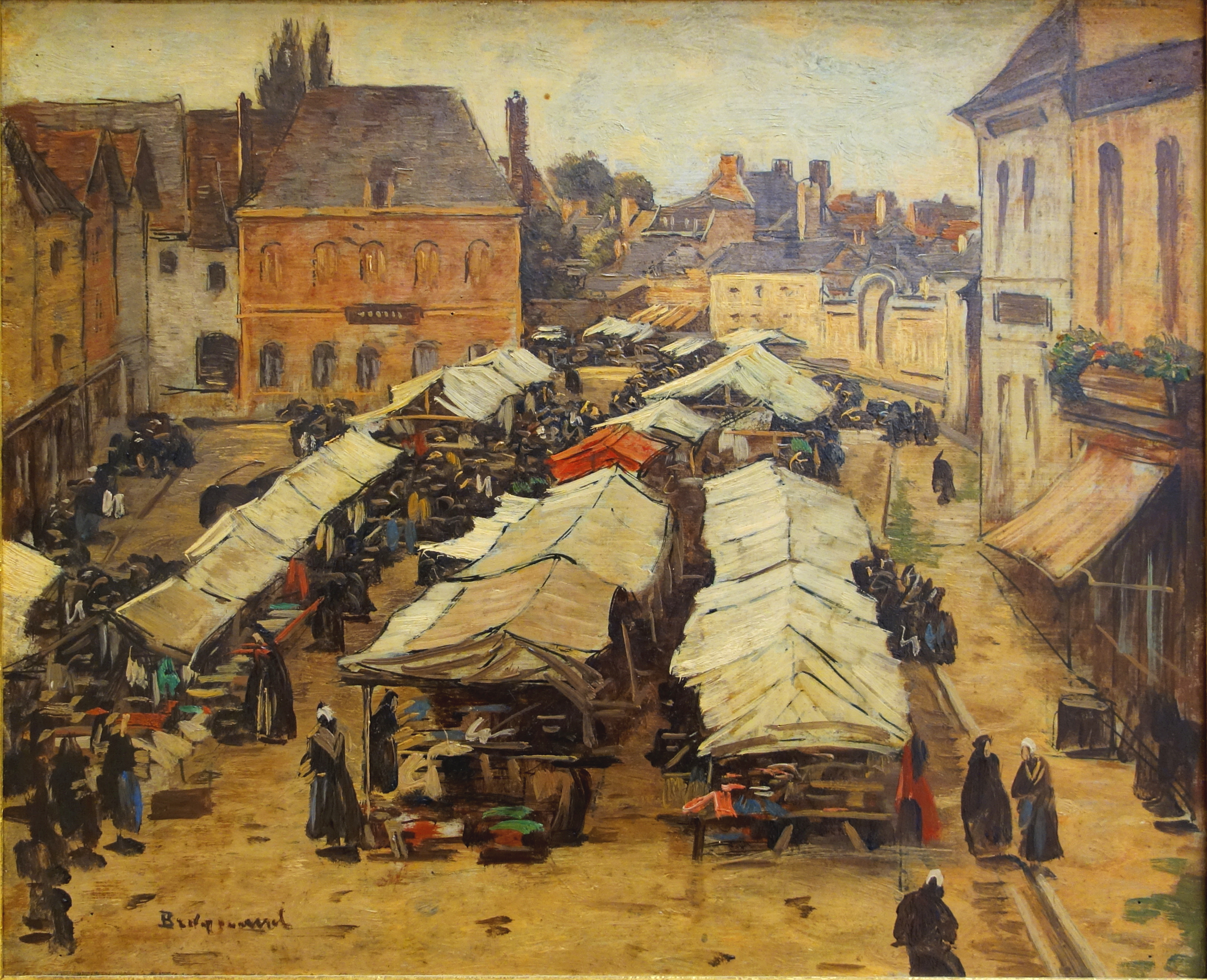 La place de marché à Abbeville au musée des beaux-arts de Rouen.